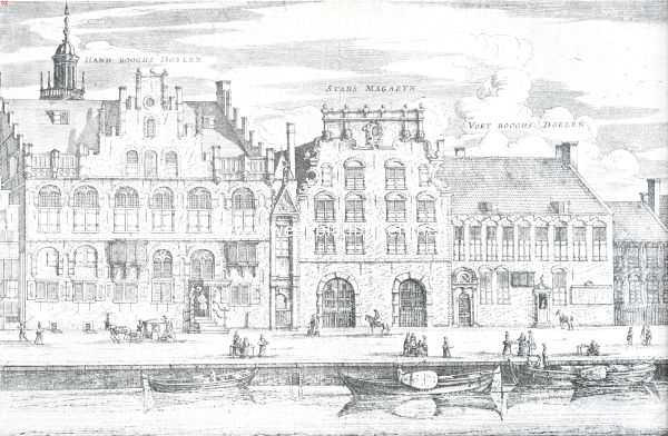 Hand- en Voetboogdoelen en het Westindisch Huis op het Singel